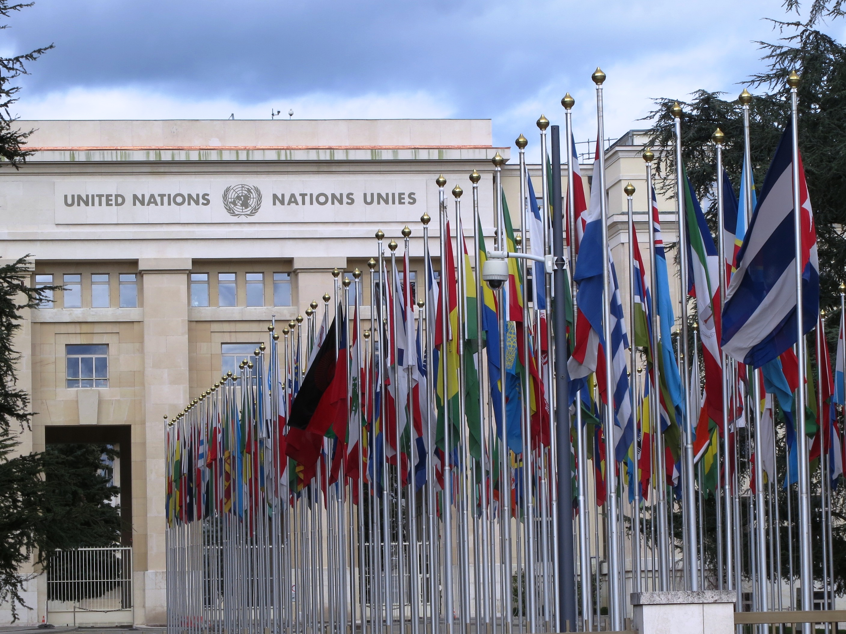 Völkerbundspalast Genf, Schweiz